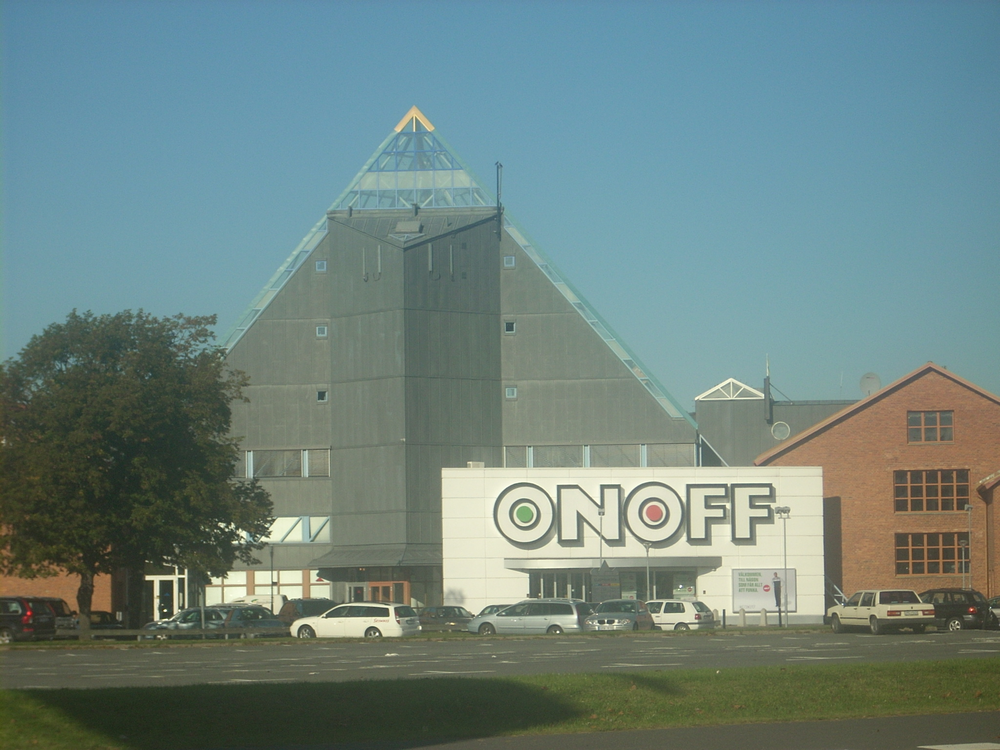 OnOff på A6 i Jönköping